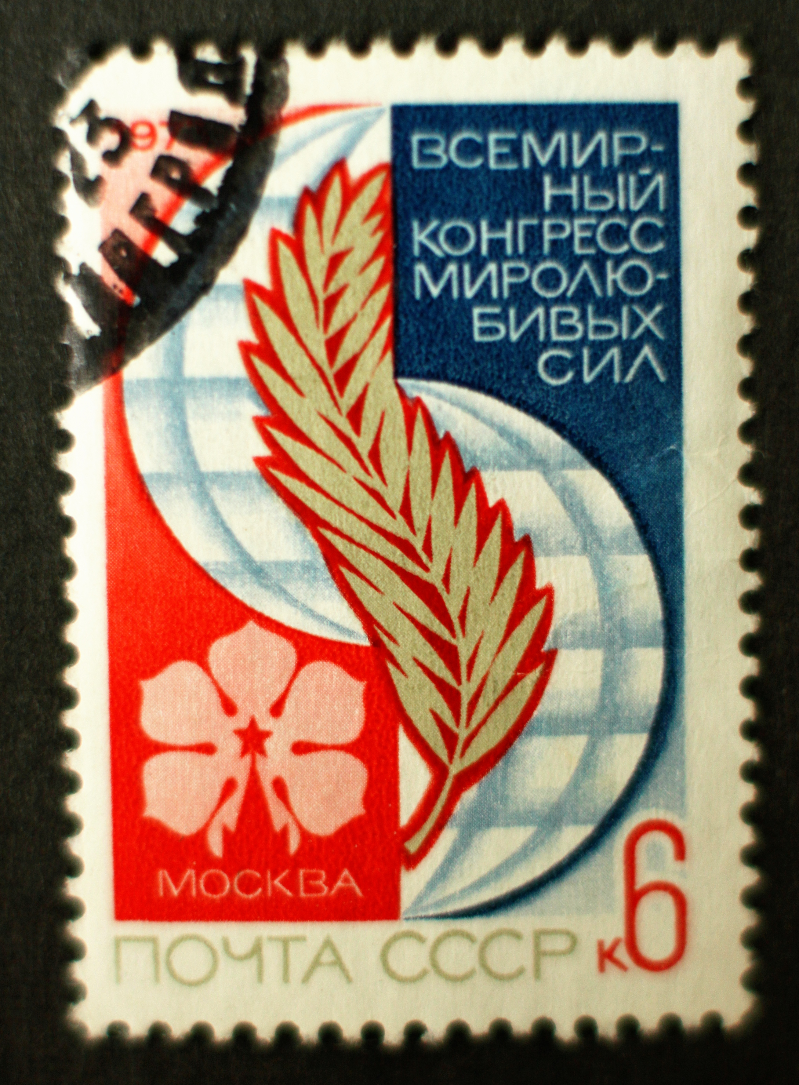 Briefmarke, Sowjetunion